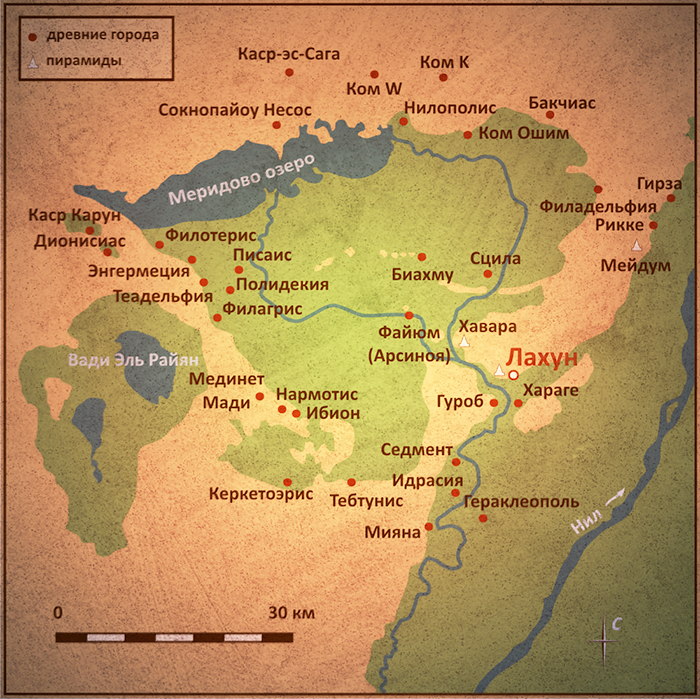 El-Lahun. Village in Fayyum, Egypt.